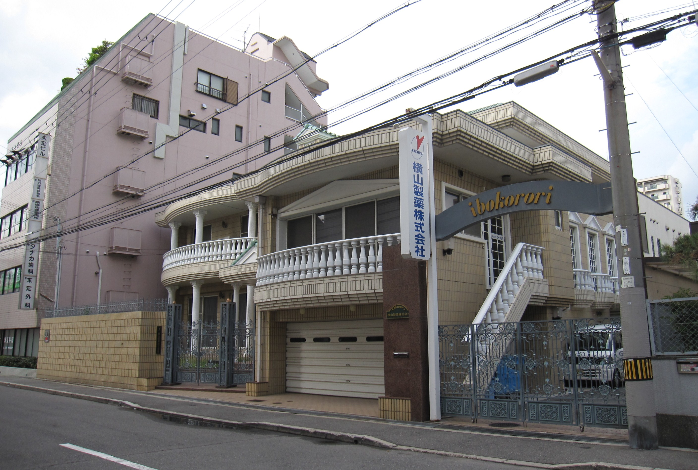 横山製薬本社